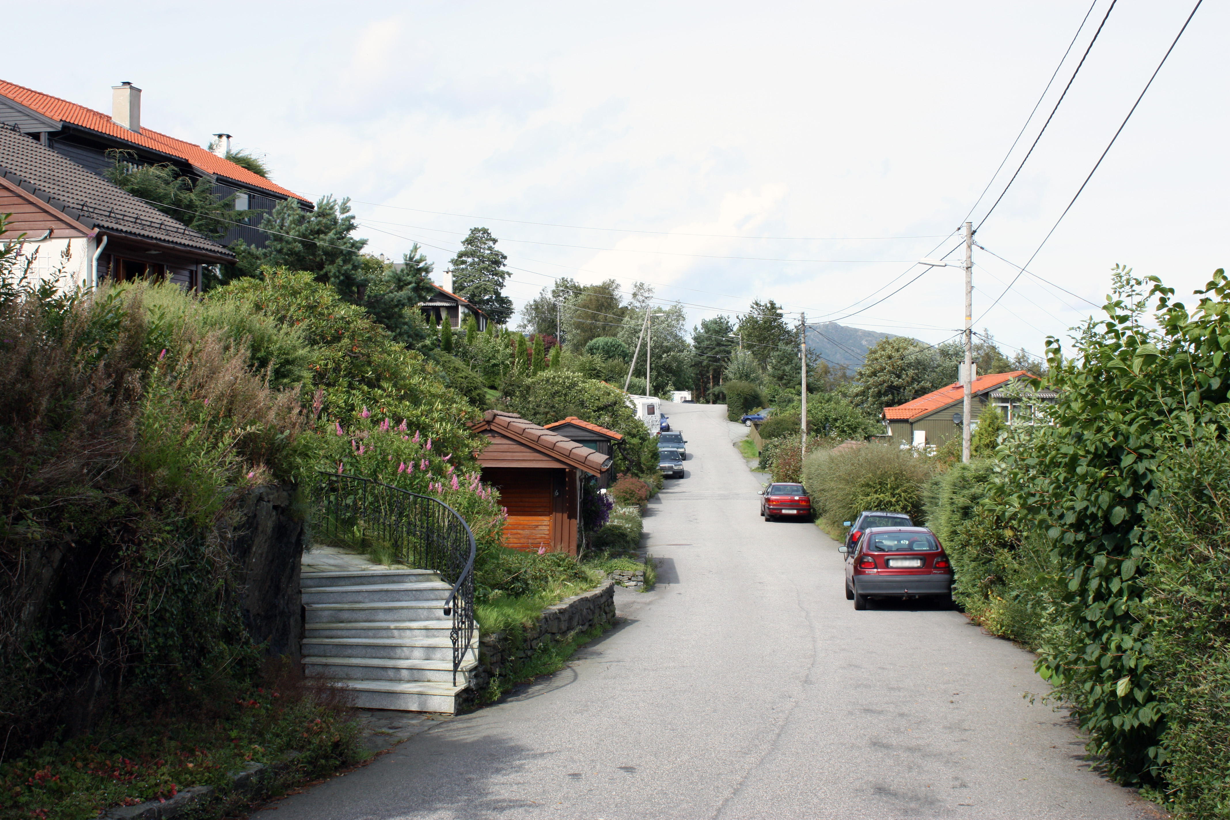 Nedre Bjørkåsen, Fana, Bergen. August 2009.